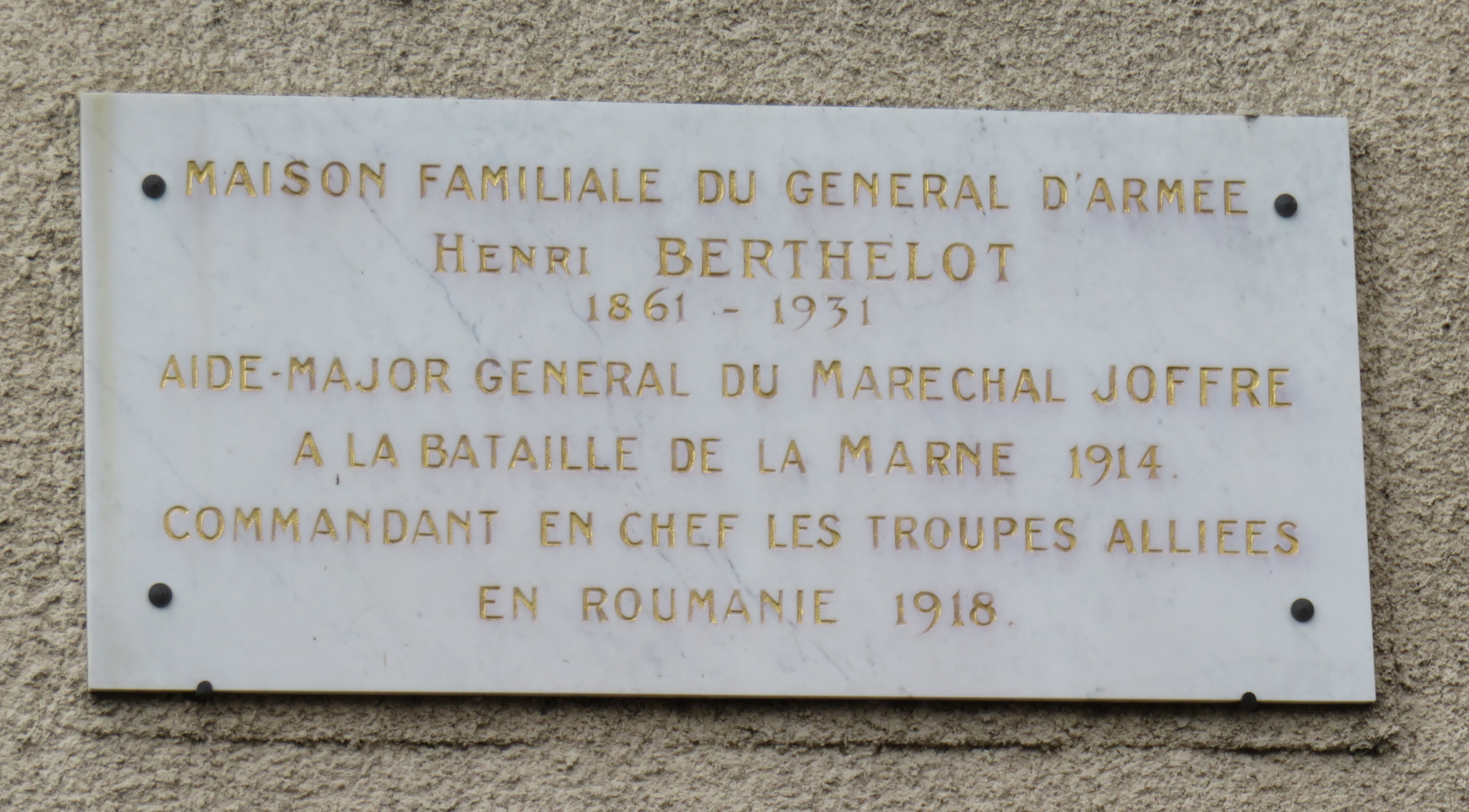 Plaque commémorative de la maison familiale d'Henri Berthelot, à Nervieux (Loire, France).